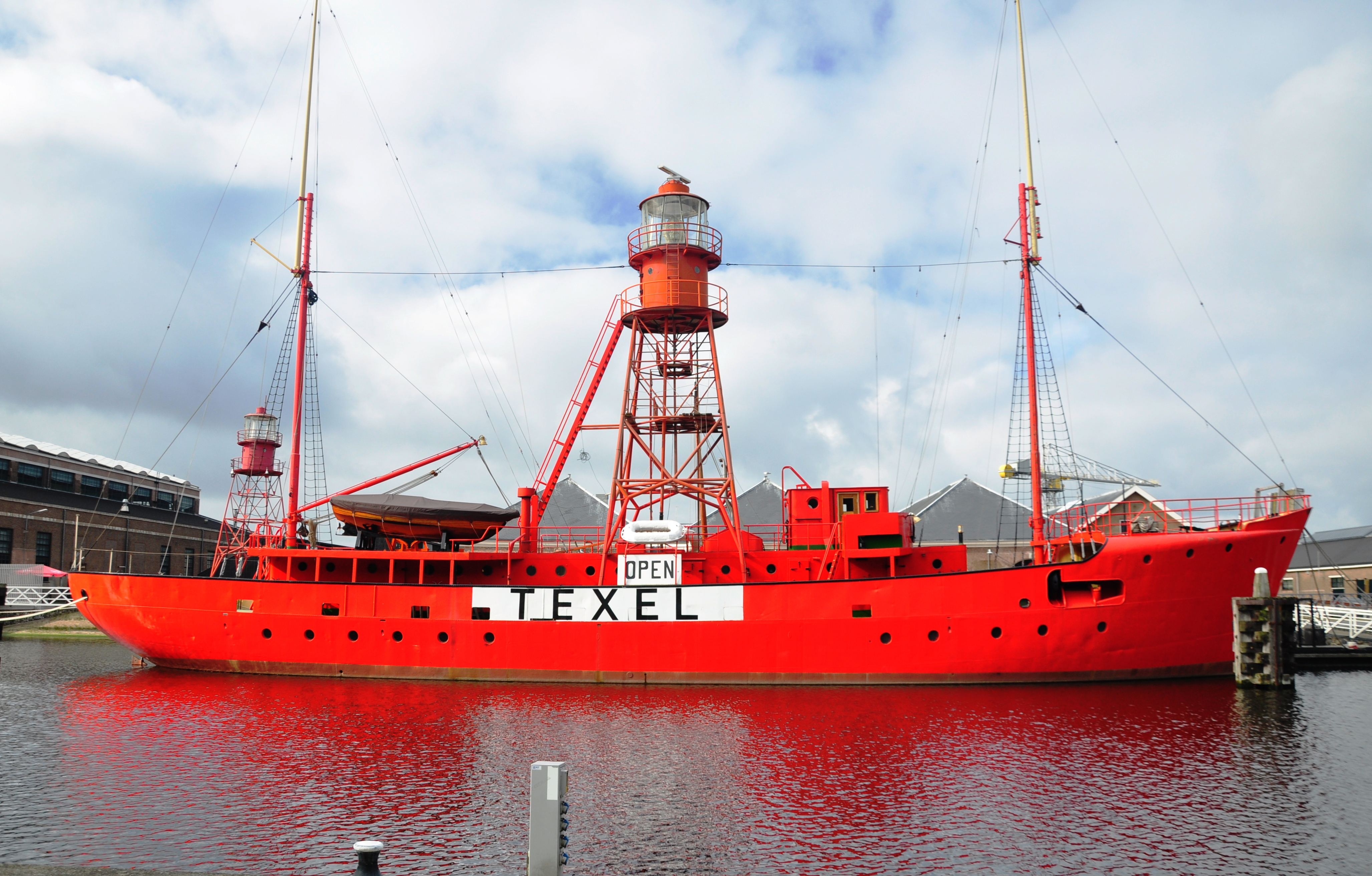 Den Helder, Feuerschiff Texel, Museumshafen, Holland